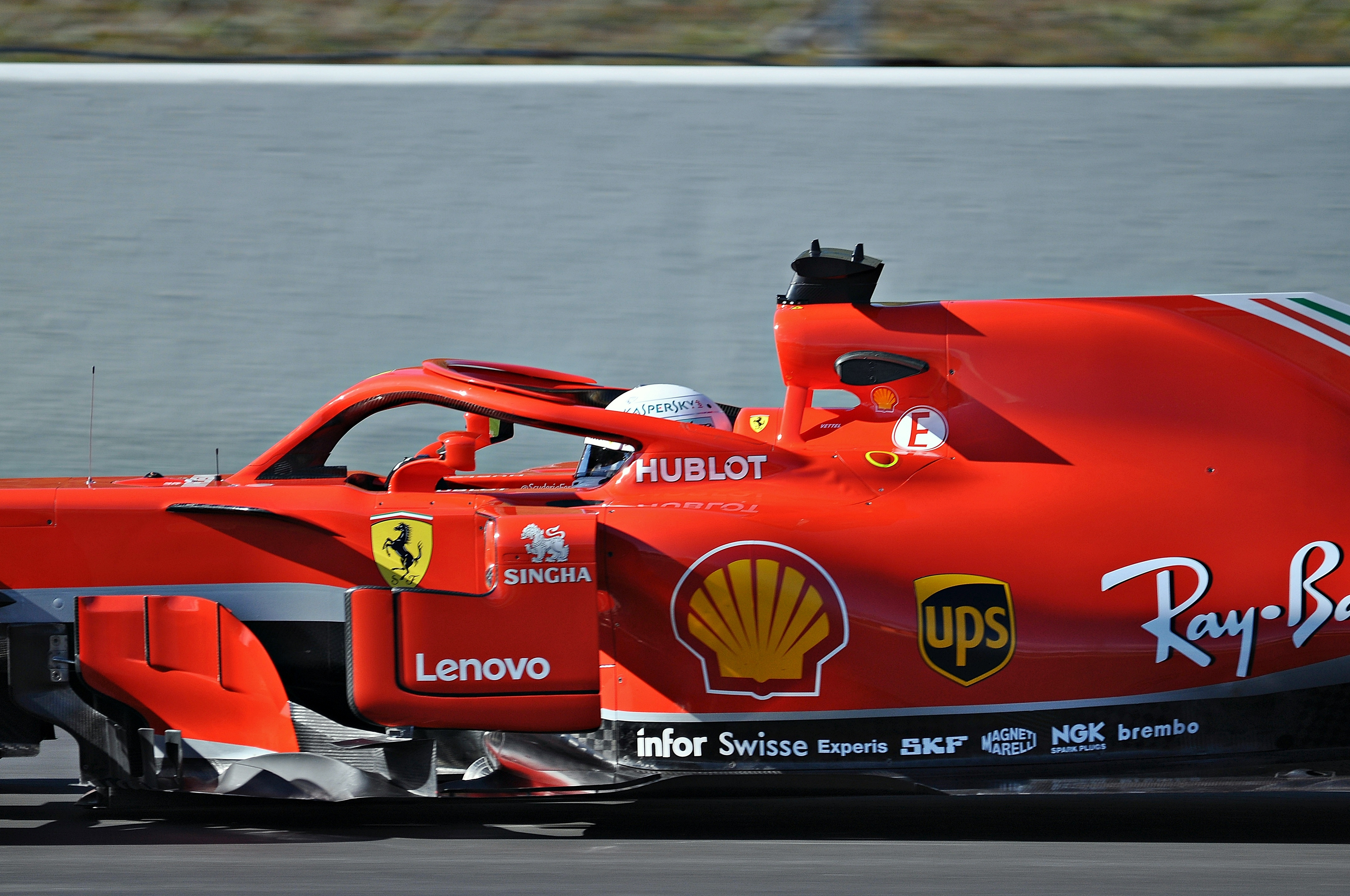 Ferrari SF71H-Circuit de Barcelona